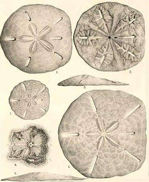 Leodia sexiesperforata (Leske, 1778)